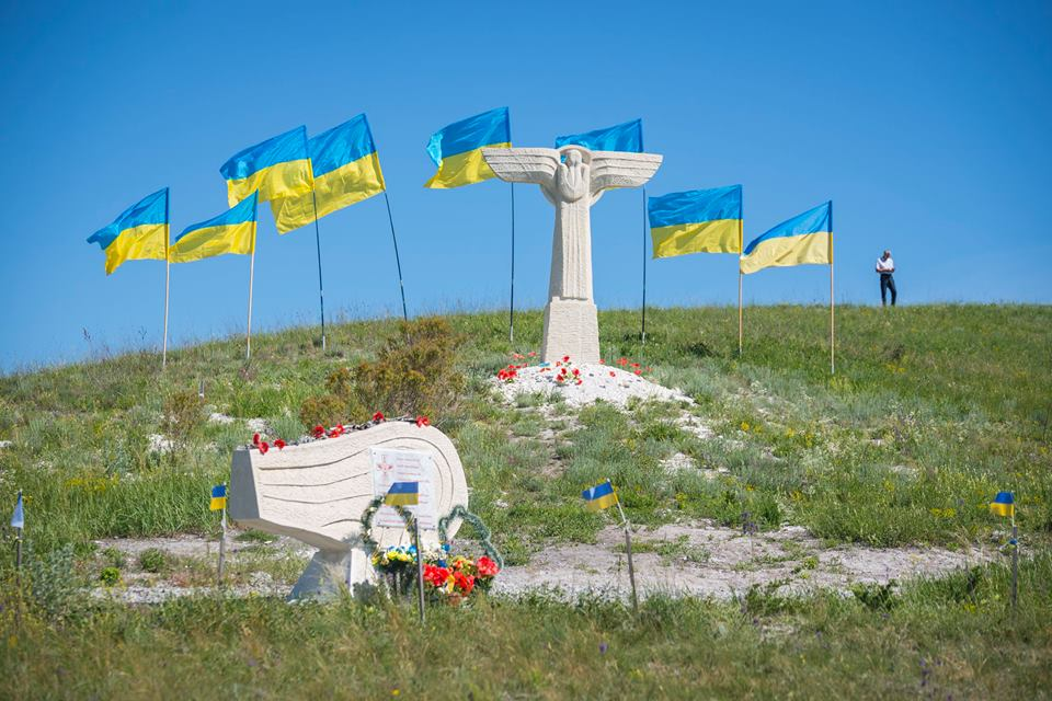 Мемоморіал "Скорботний янгол"